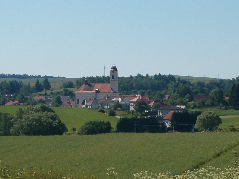 Opatov village, Vysočina region, Czech Republic